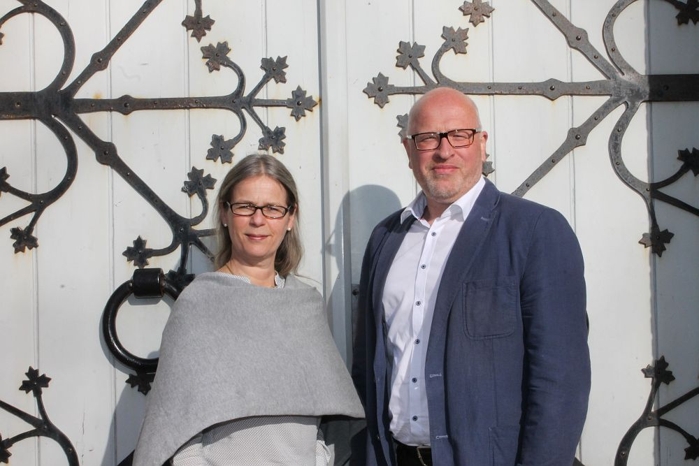 Seit dem 1. April 2016 im Amt: Bürgervorsteherin Sabine Detert und Bürgermeister Andreas Deidert